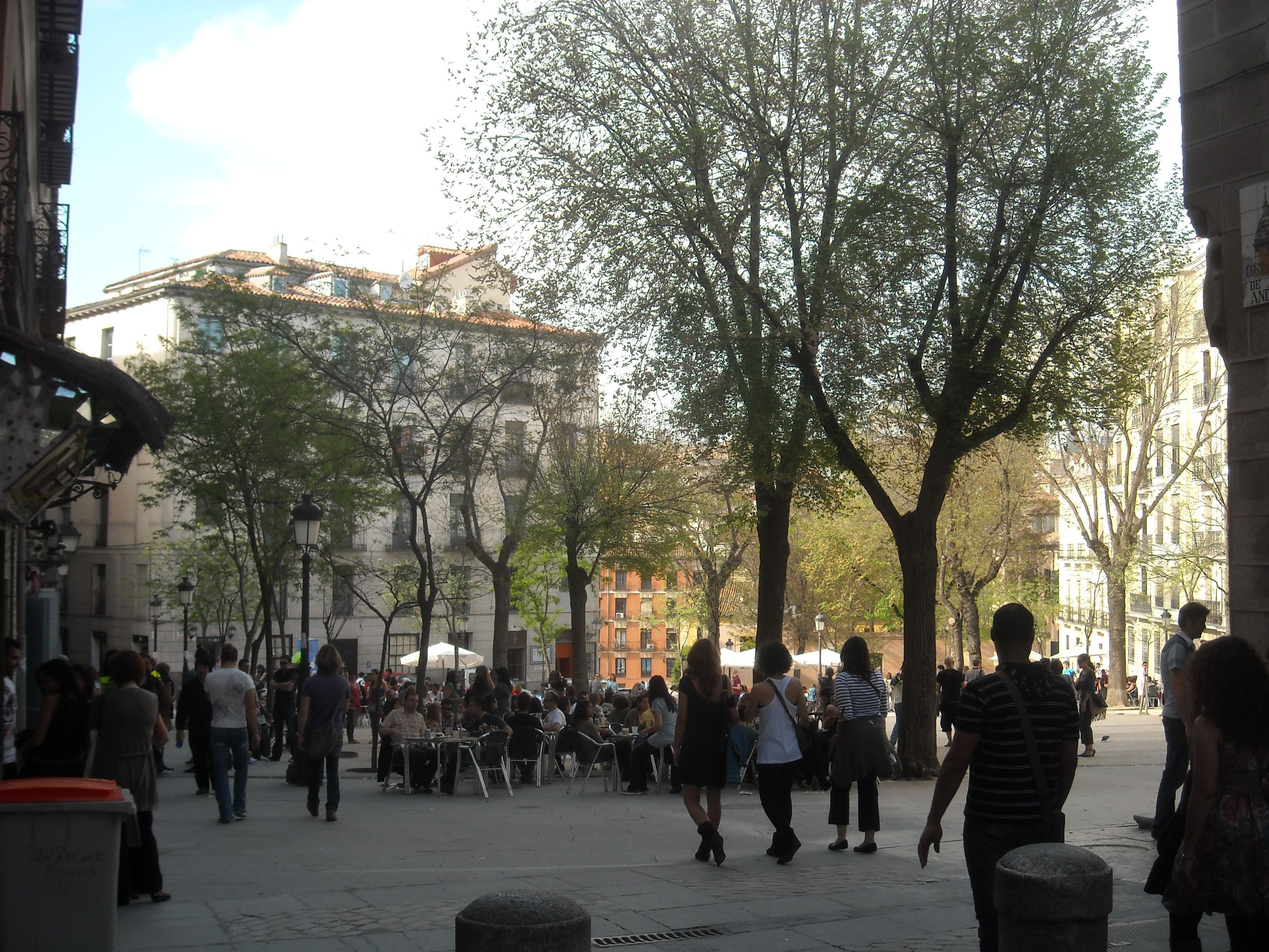 Plaza de la Paja, Madrid, España. Vista desde la Costanilla de San Andrés.